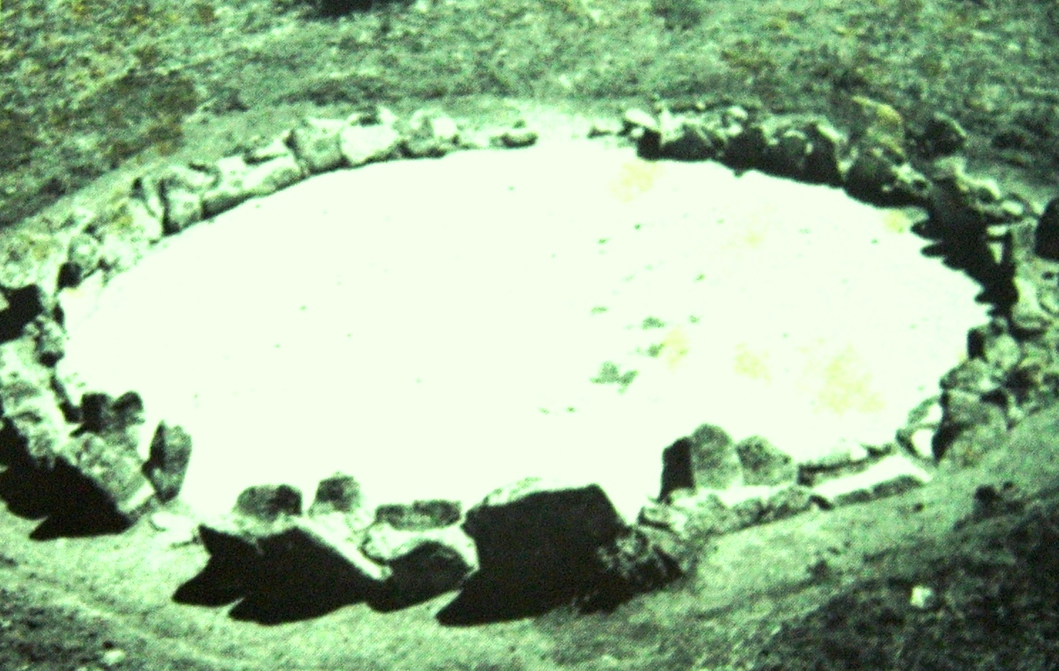 Sardinia - Italy - Circolo megalittico Li Muri - Arzachena By Shardan